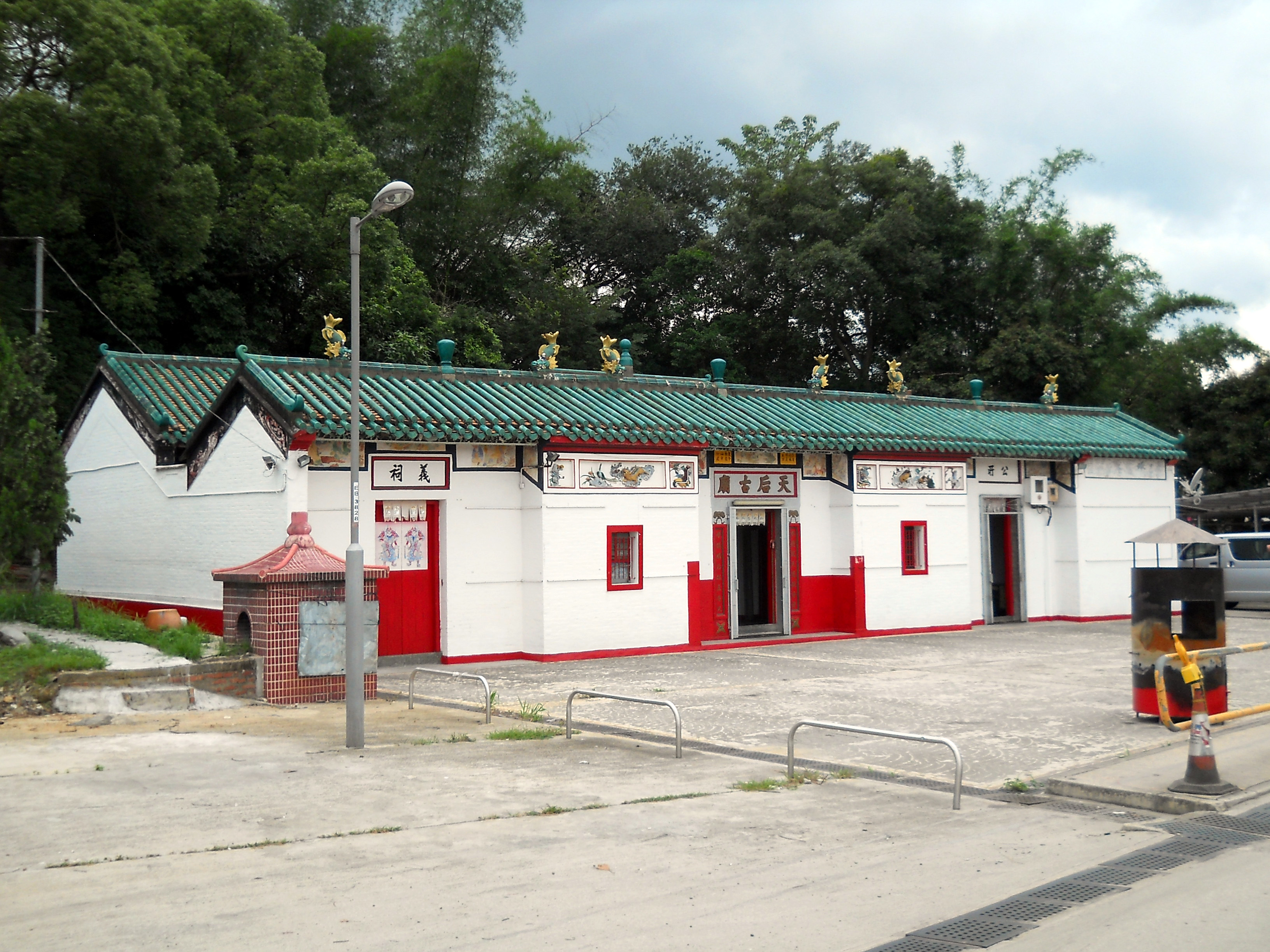 中文（香港）: 坪源天后古廟